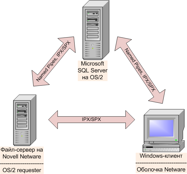 Новая сетевая модель Microsoft SQL Server 1.11